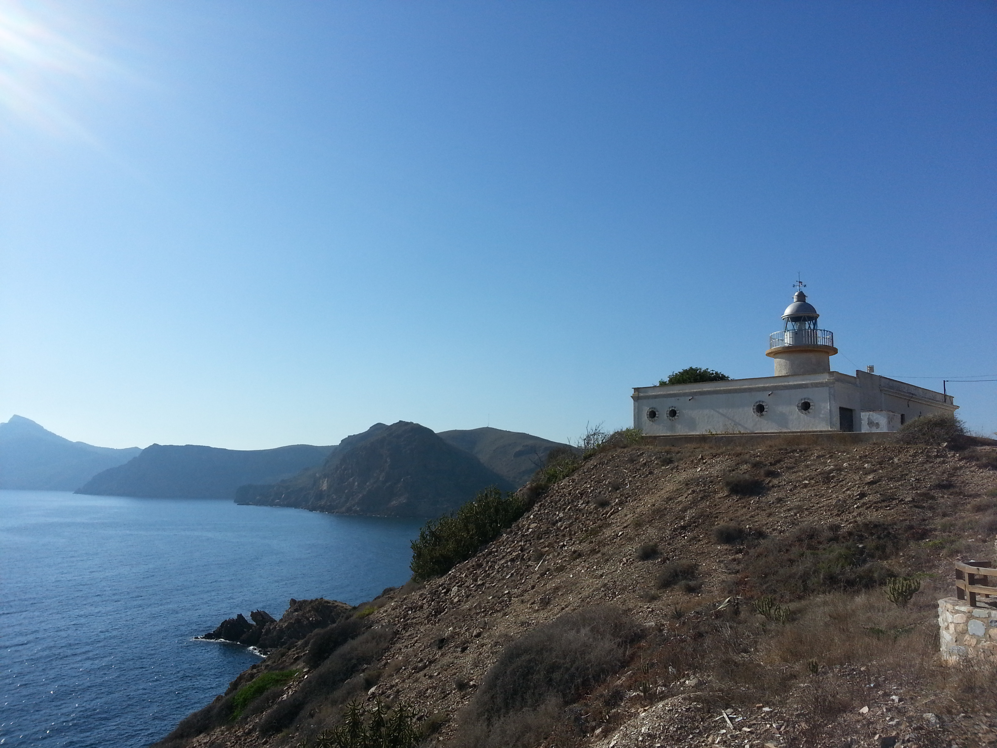 Vista del Faro de Portman